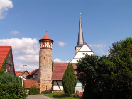 Hutturm der Kirchenburg von Vachdorf